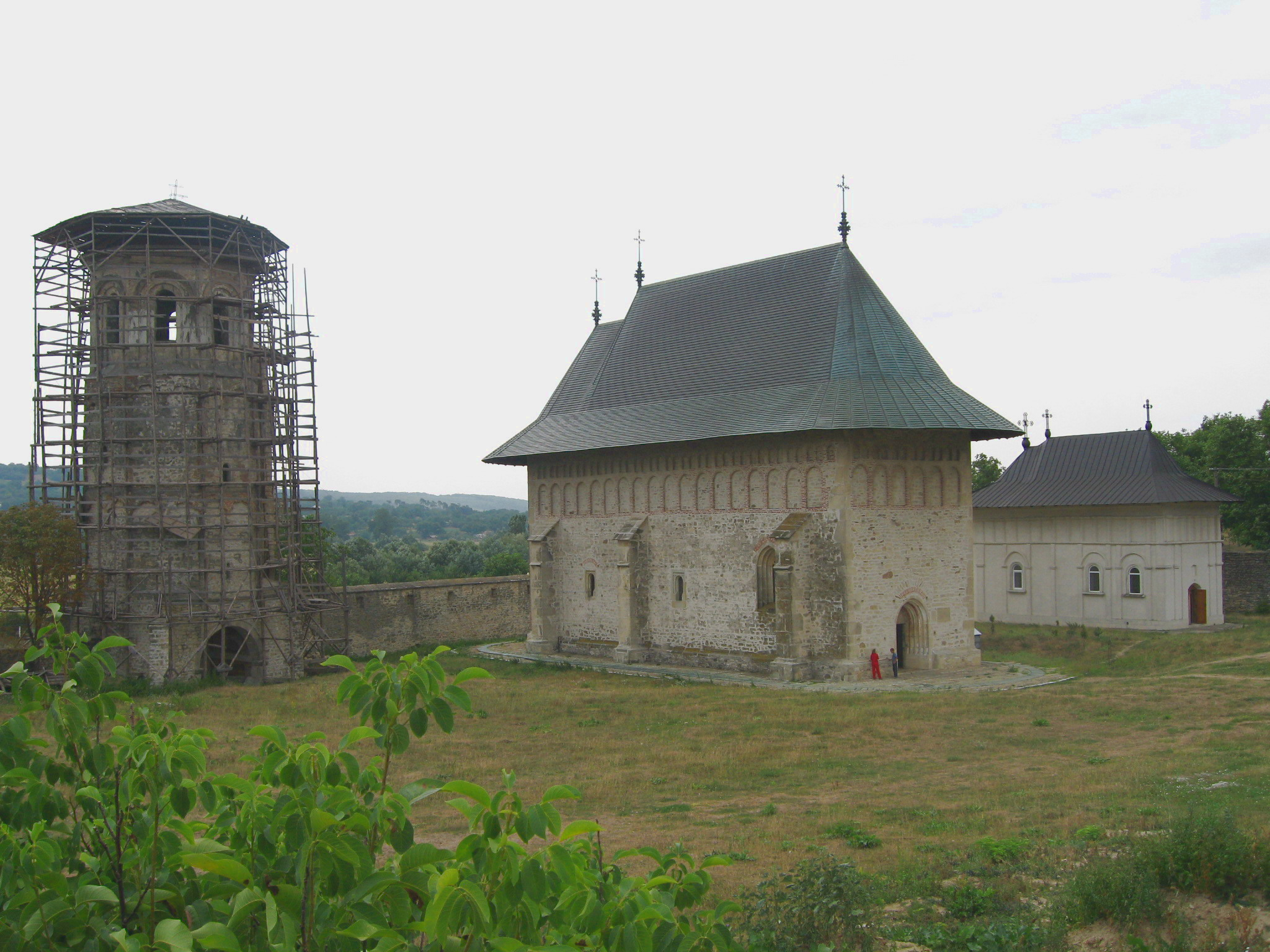 Mănăstirea Dobrovăţ